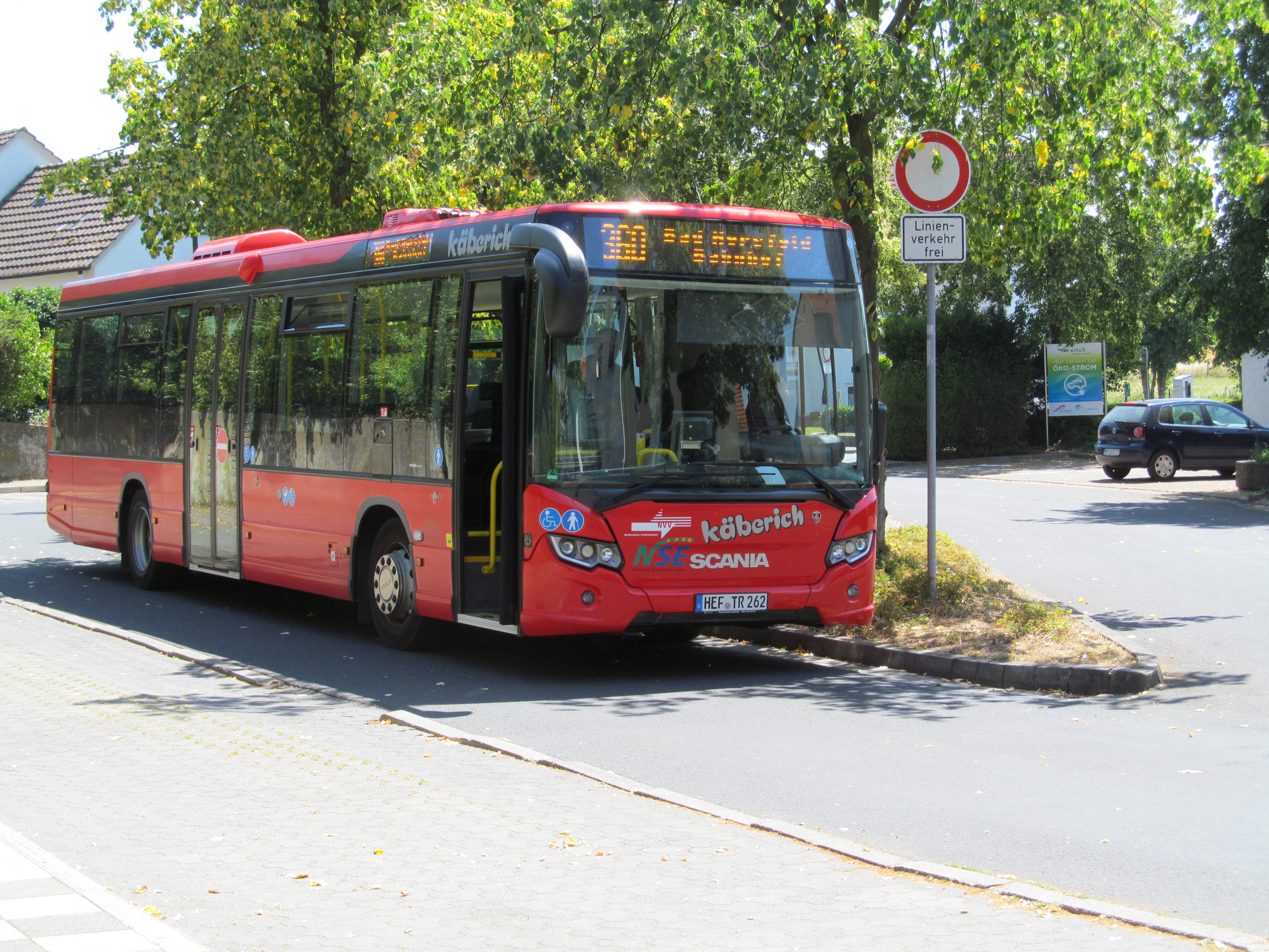 Bus der Firma Käberich auf der NVV-Linie 360 in der Wendeschleife der Bushaltestelle Eiterfeld, Ortsmitte